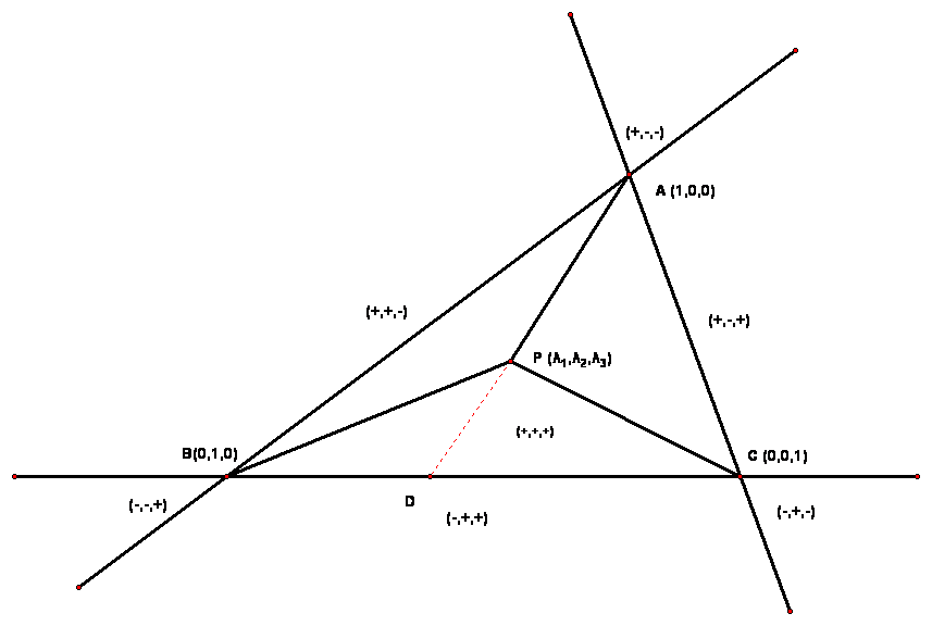 areal coordinates of triangle 面积坐标示意图